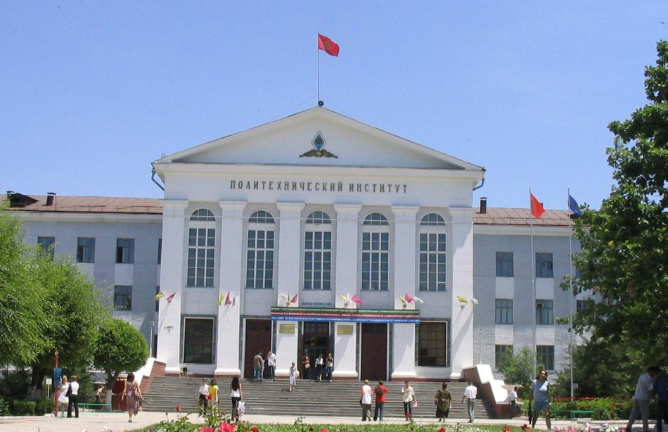 Политехнический институт Кыргызского государственного технического университета имени И. Раззакова